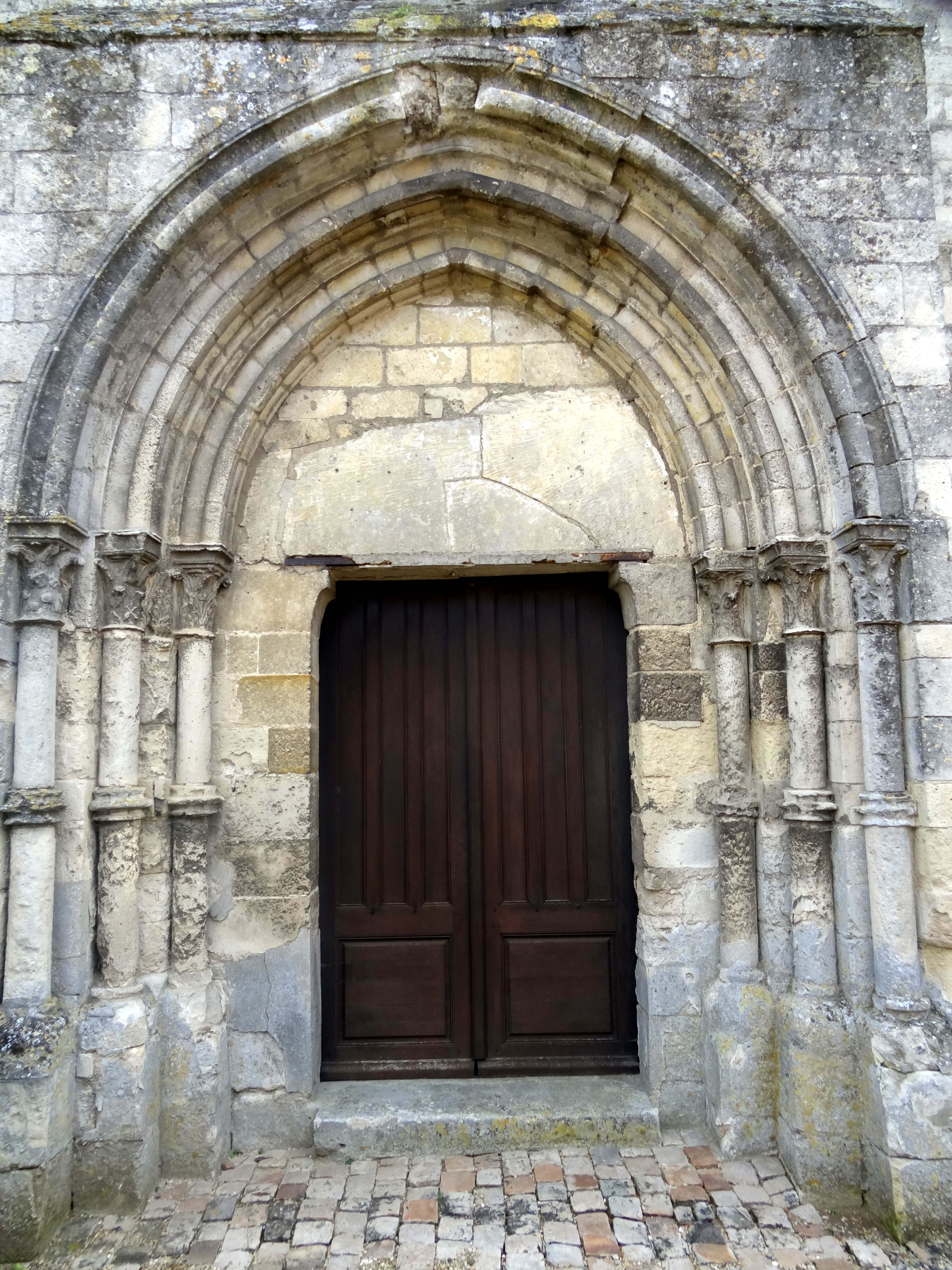 Église Saint-Barthélemy de Villeneuve-sur-Verberie - voir titre.